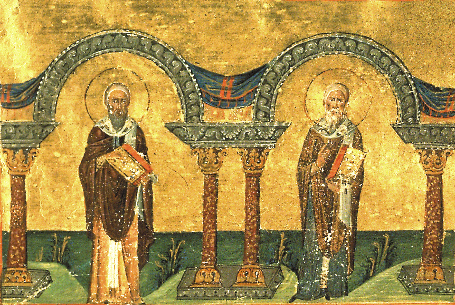 Святители Афанасий и Кирилл Александрийские Константинополь. 985 г. Миниатюра Минология Василия II. Ватиканская библиотека. Рим.